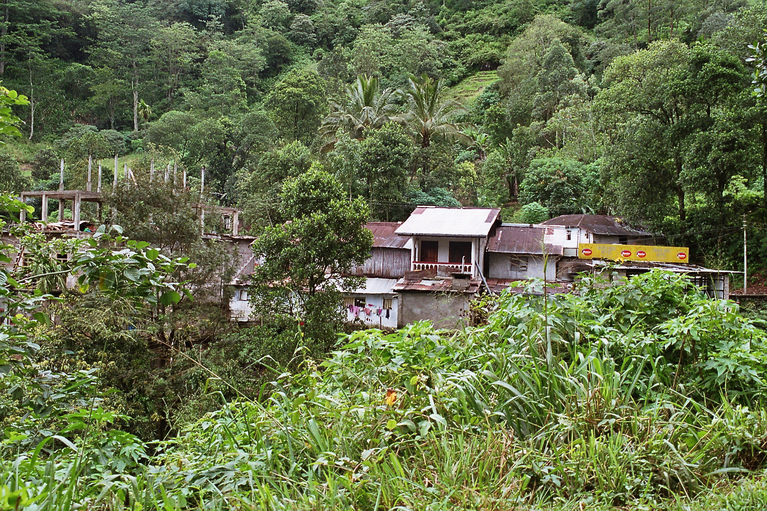 Tea garden in Sri Lanka